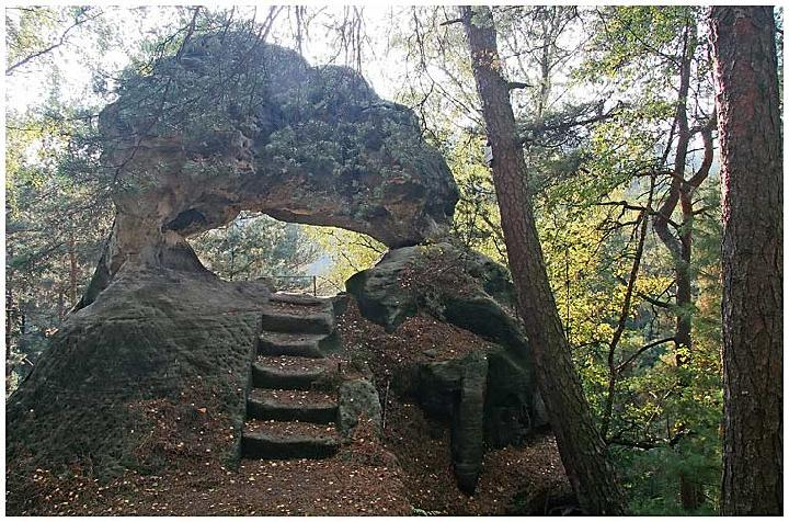 Slunečná brána na úbočí Kamenného vrchu u Bynovce v Labských pískovcích autor: Prazak date: October 2006